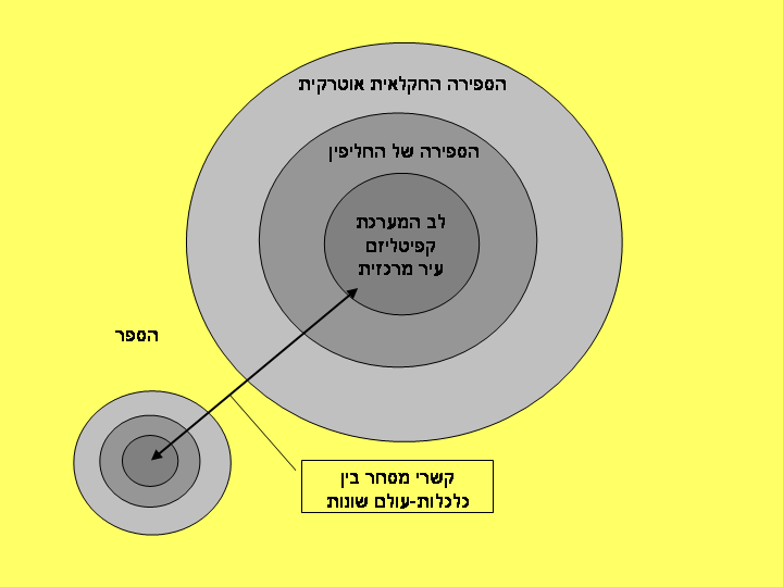 braudel shperes